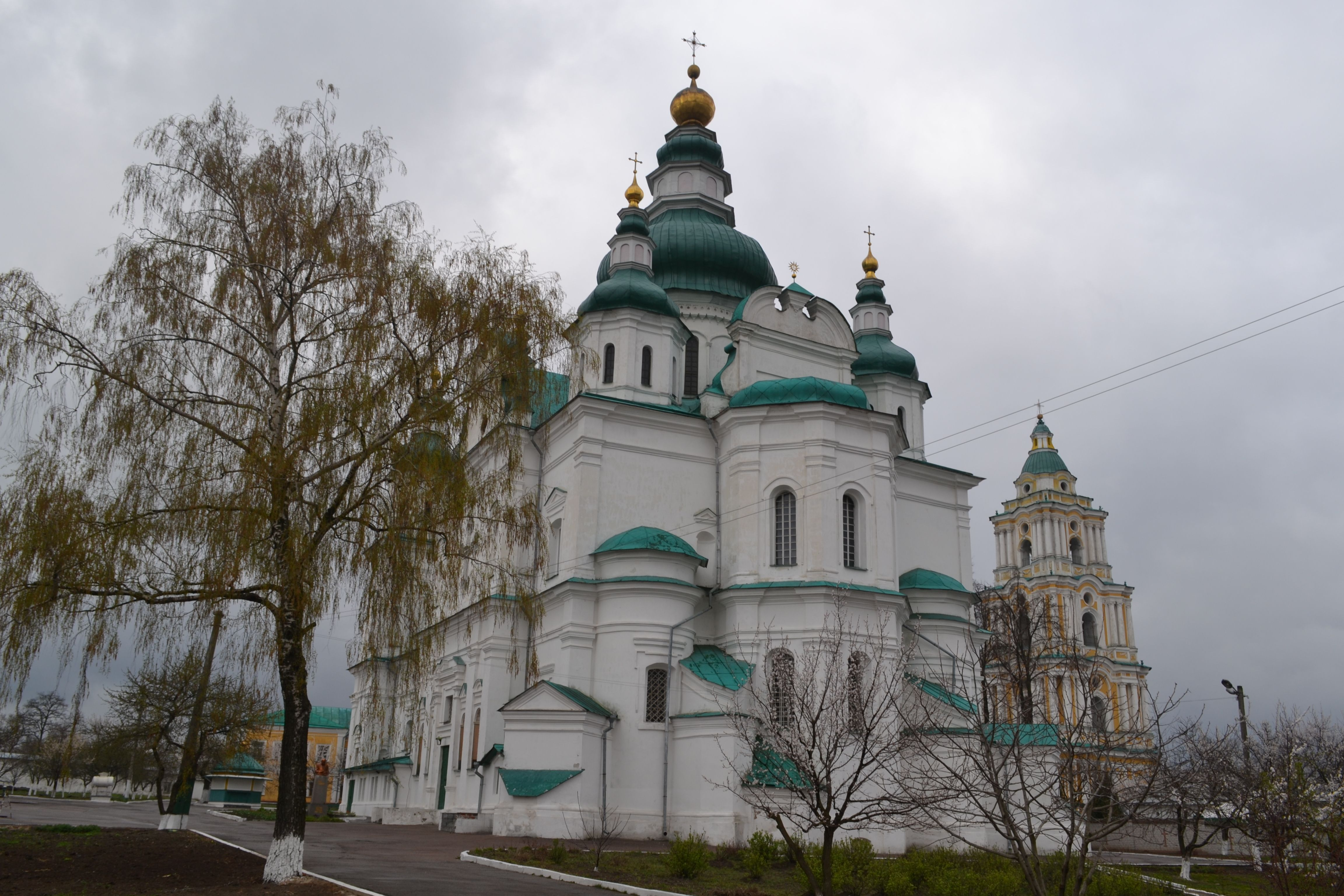 Троїцький собор, Чернігів, вул.Толстого, 92-Е